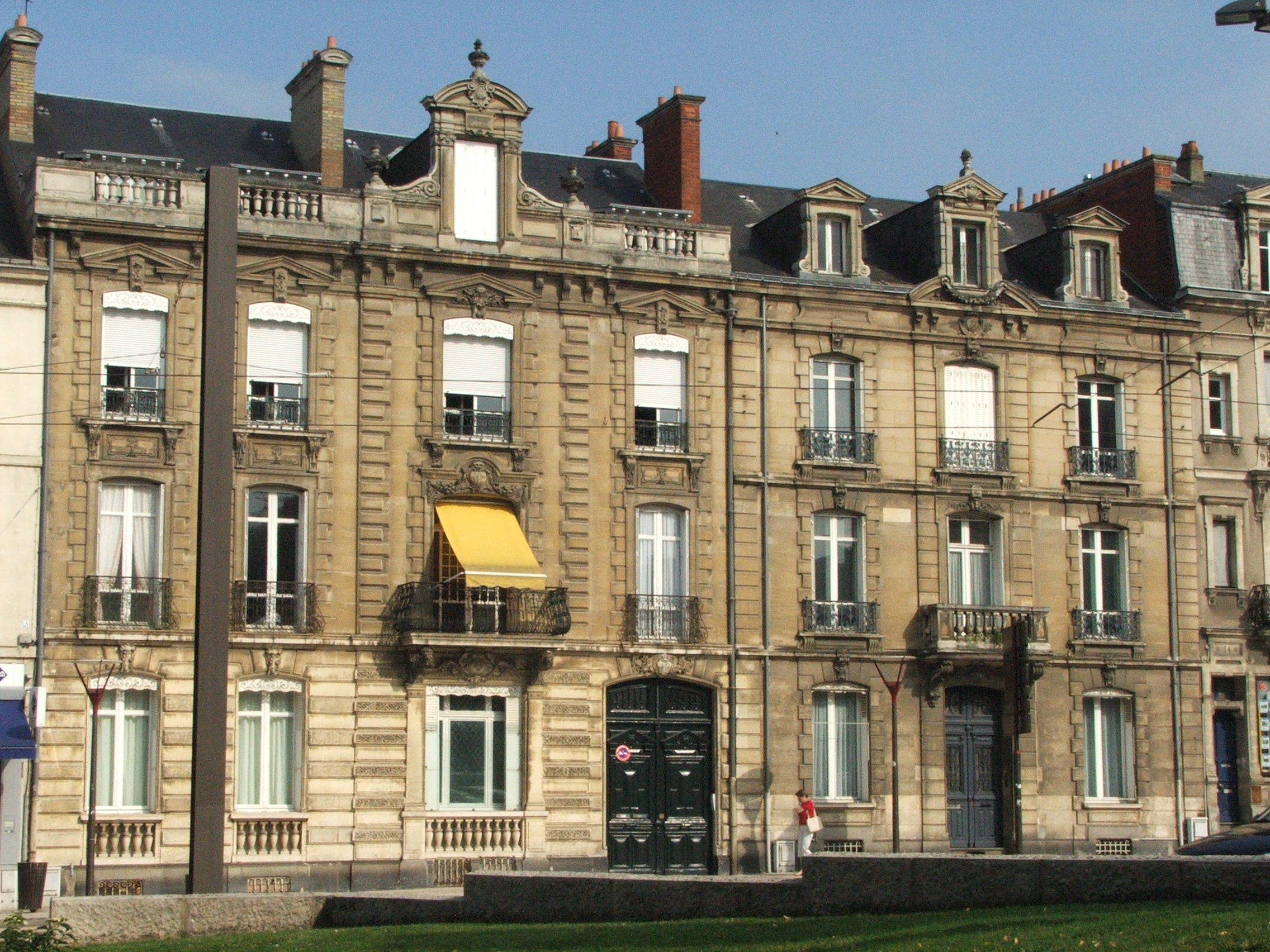 Hôtel particulier du XIXe siècle boulevard du général Leclerc au Mans.